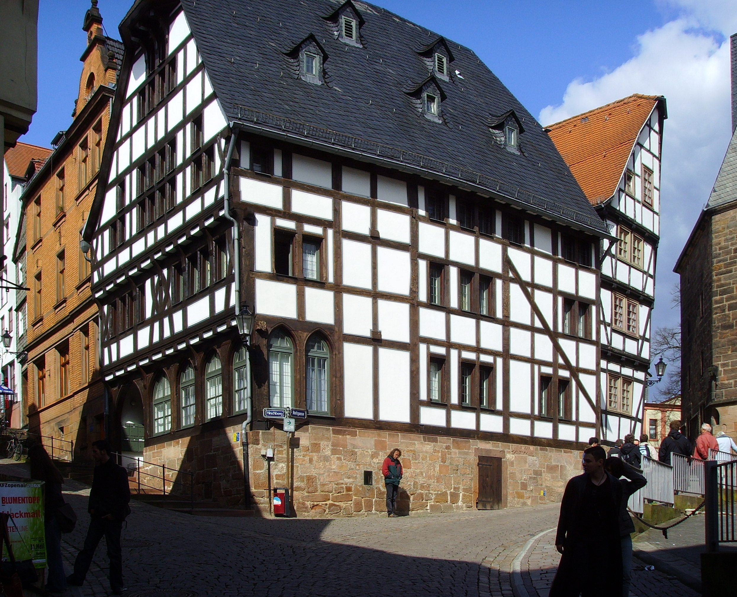 Marburg, Hirschberg 13, ist das älteste Fachwerkgebäude der Stadt, erbaut 1321 nach dem großen Stadtbrand von 1319. Typisch für die Bauweise älterer Fachwerkhäuser sind Balken, die über mehr als ein Geschoss hinausreichen.